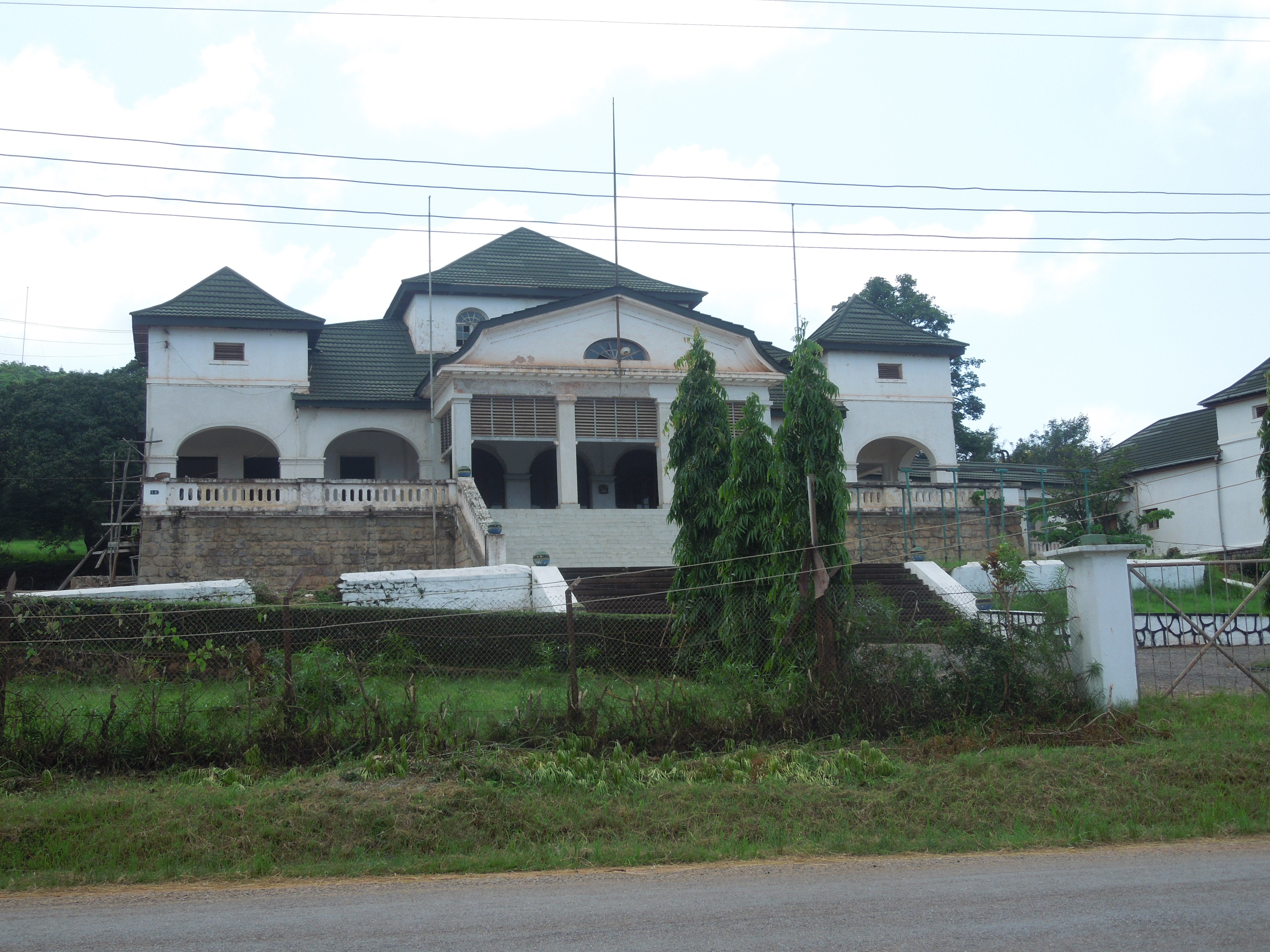 Das "Kaiser House " in Kigoma West Tansania ehemals Deutsch Ostafrika,als Jagdschloss für den Deutschen Kaiser Wilhelm II gebaut der Deutsch Ostafrika im Sommer 1914 besuchen wollte,die Reise fand angesichts des drohenden Krieges nie statt. Heute wird das Gebäude von der Polizei Tansanias benutzt. Es gibt einen Unterirdischen Tunnel der zum Hafen führt.